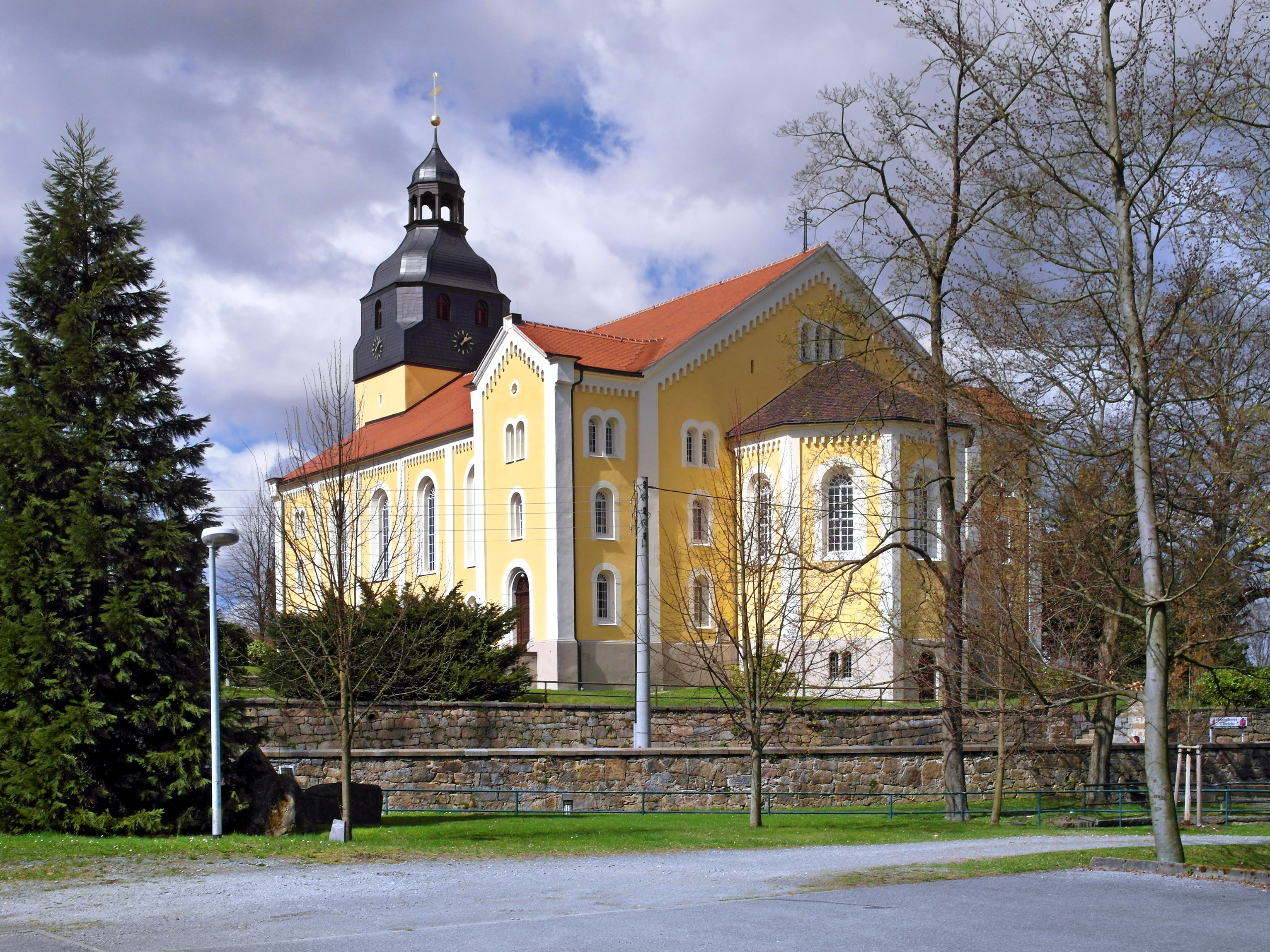 06.04.2017 01904 Steinigtwolmsdorf: Evangelische Kirche (GMP: 51.063031,14.346140). Heutiger Bau von 1860-1861. Sicht von Südosten. [SAM9252.JPG]20170406310DR.JPG(c)Blobelt